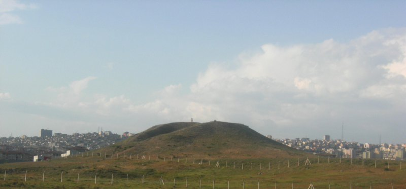 Yumurtatepe Tümülüsü